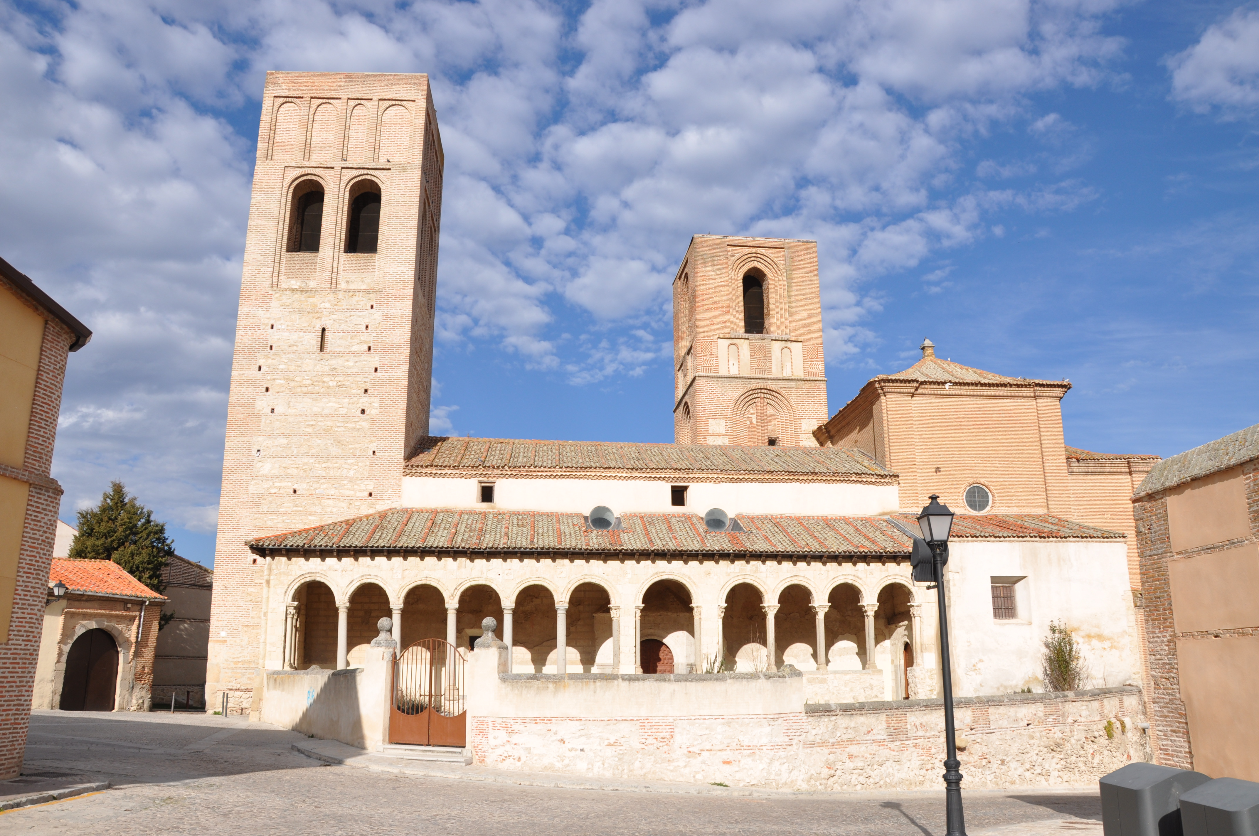 Iglesia de San Martín, Arévalo, AV, España